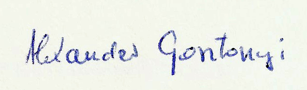 Alexander Gosztonyi. Signatur seiner Widmung eines Buches an mich vom 2.1.1974